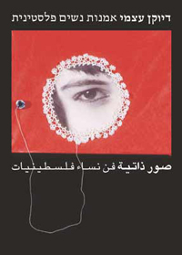 בן צבי, טל, לרר, יעל (עורכות) 2001. דיוקן עצמי אמנות נשים פלסטינית, הוצאת אנדלוס.